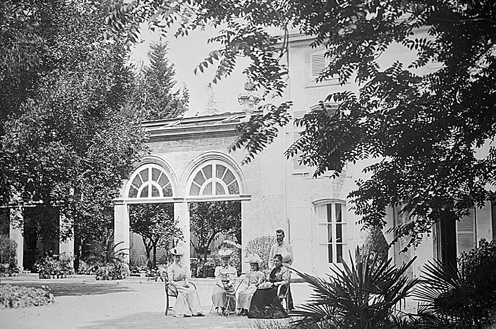 Raymond de Galbert et sa famille, posant devant le château à la fin du XIXe siècle